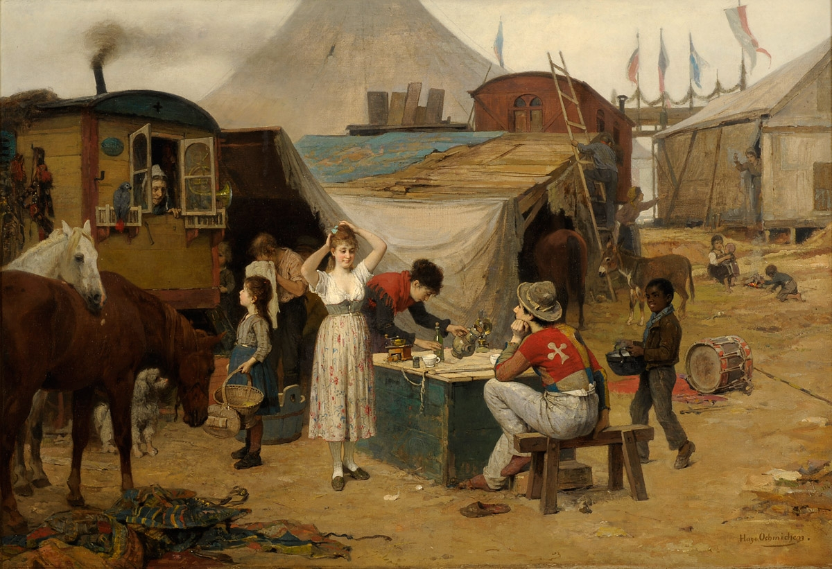 Jahrmarktszene. Signiert. Öl auf Leinwand, 72 x 104 cm